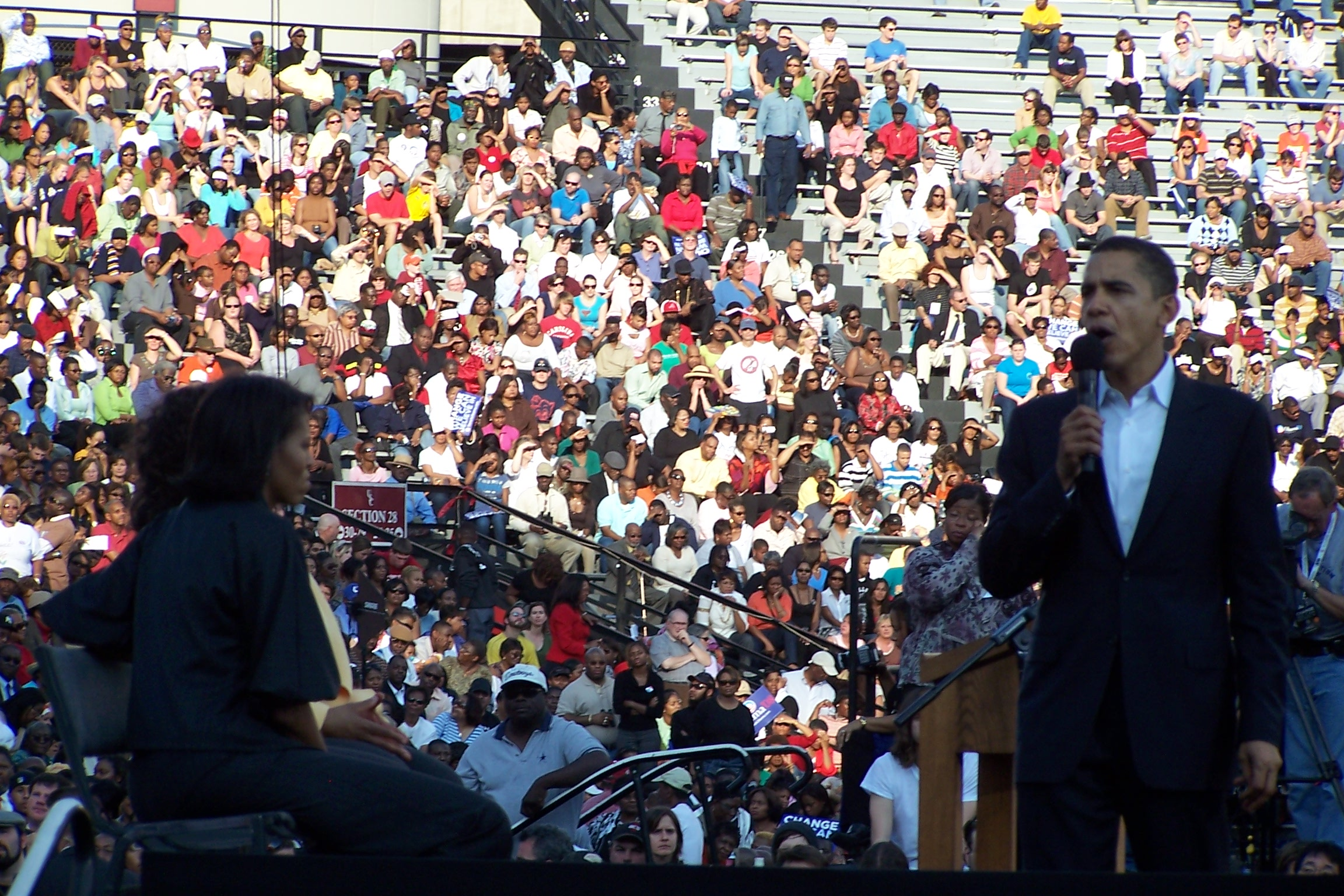 Obama Addressing